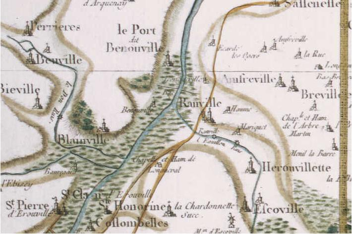 Ranville sur le Plan Cassini